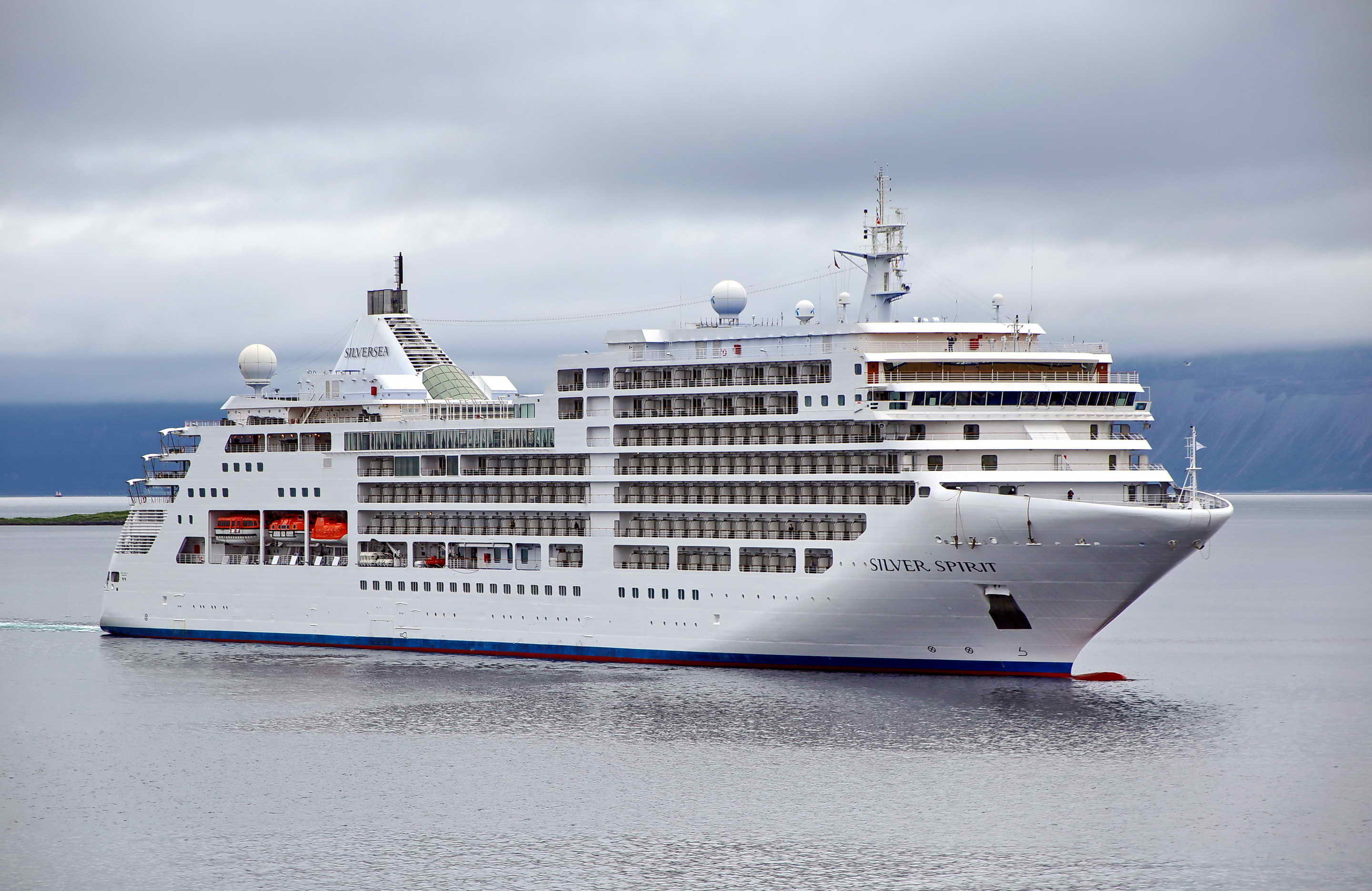 Kreuzfahrtschiff "Silver Spirit" im Juni 2018 im Anlauf auf den Hafen von Harstad